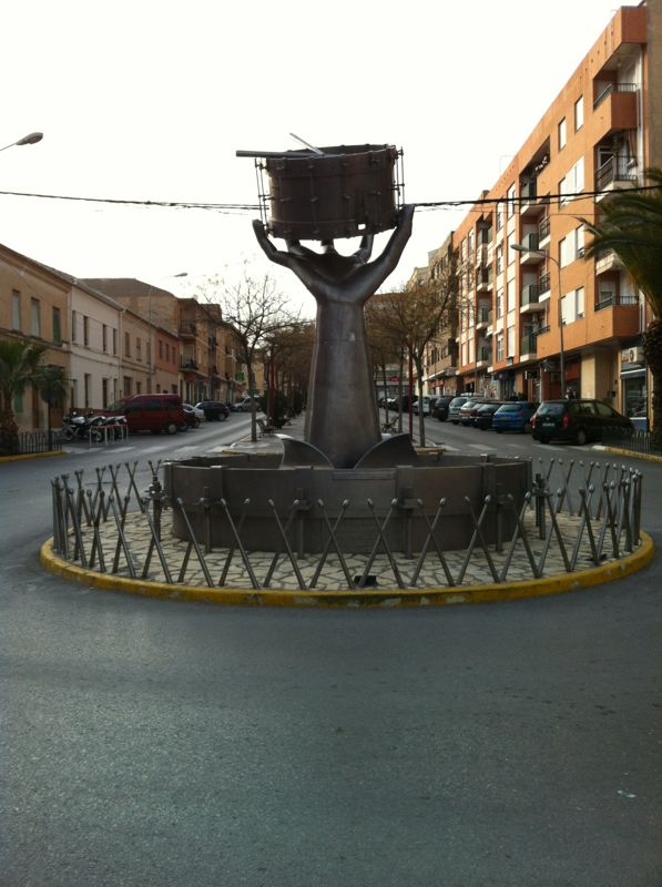 Monumento Tambor de Tobarra situado en la avenida principal